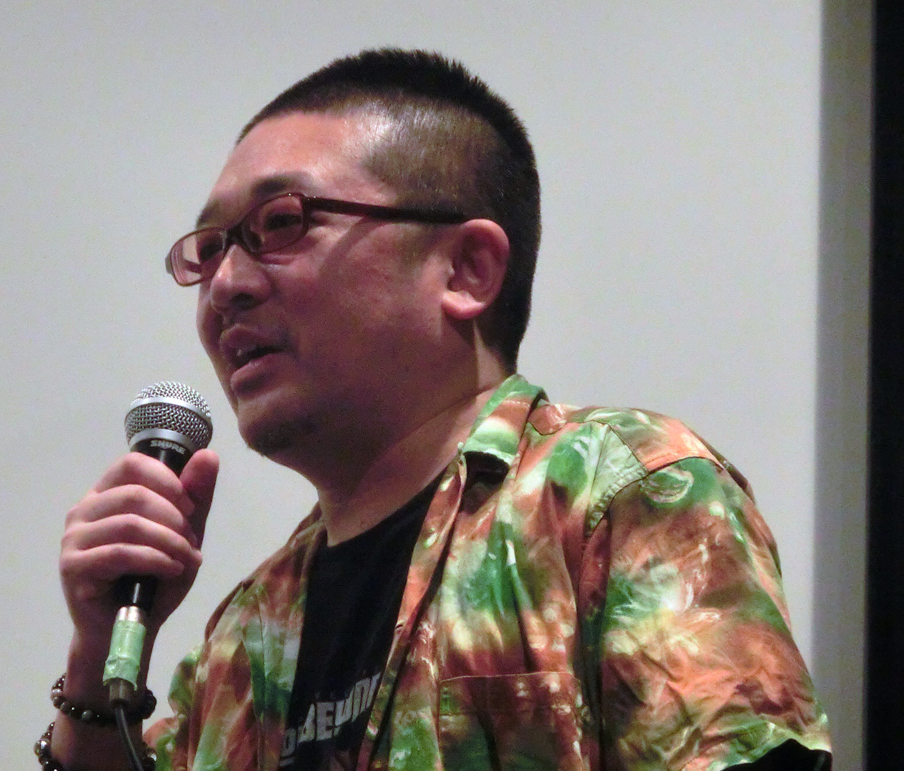 舞台挨拶をする山内大輔監督